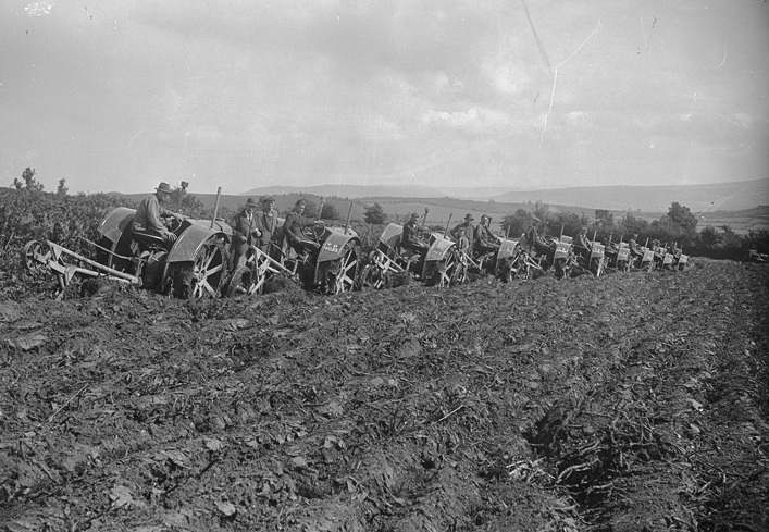 Ffotograffydd/Photographer: P B Abery (1877?-1948) Dyddiad/Date: [194-?] Cyfrwng/Medium: Negydd gwydr / Glass negative Maint/Dimensions: 119 x 163 mm. Cyfeiriad/Reference: PBA19/7 (pba00290) Rhif cofnod / Record no.: 4460667 Rhagor o wybodaeth am gasgliad P B Abery yn Llyfrgell Genedlaethol Cymru More information about the P B Abery Collection at the National Library of Wales